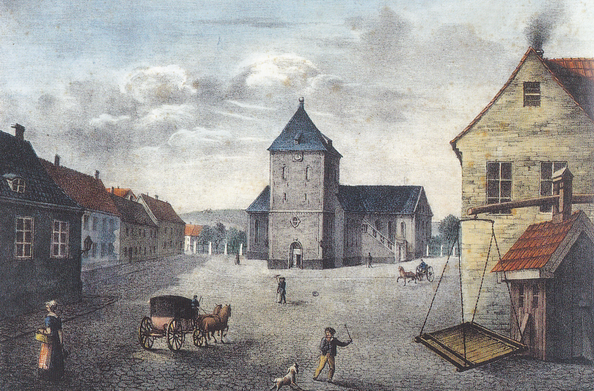 Maleri av P.F. Wergmann, fargelitografert av G. L. Fehr og fotografert av Rune Aakvik. Lastet opp til Lokalhistoriewiki av Dag Bjørnland.